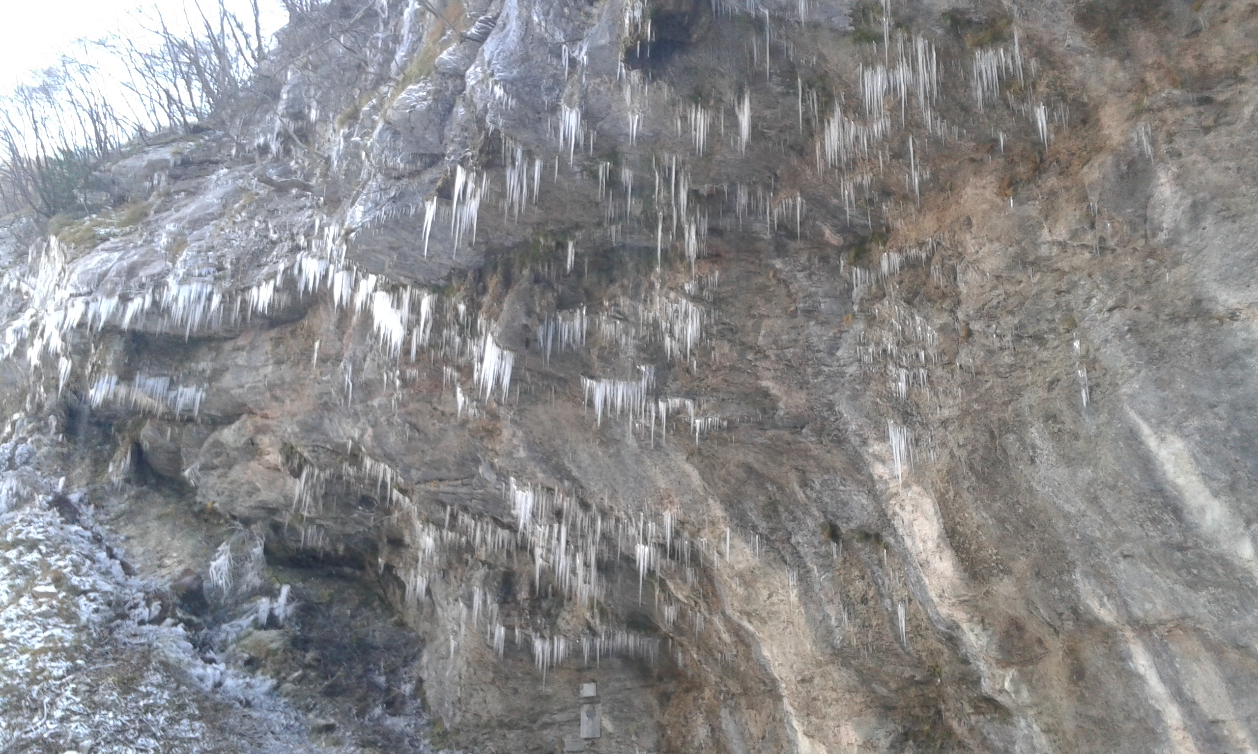 Pisciarelle Infernaccio Ghiacciate 1